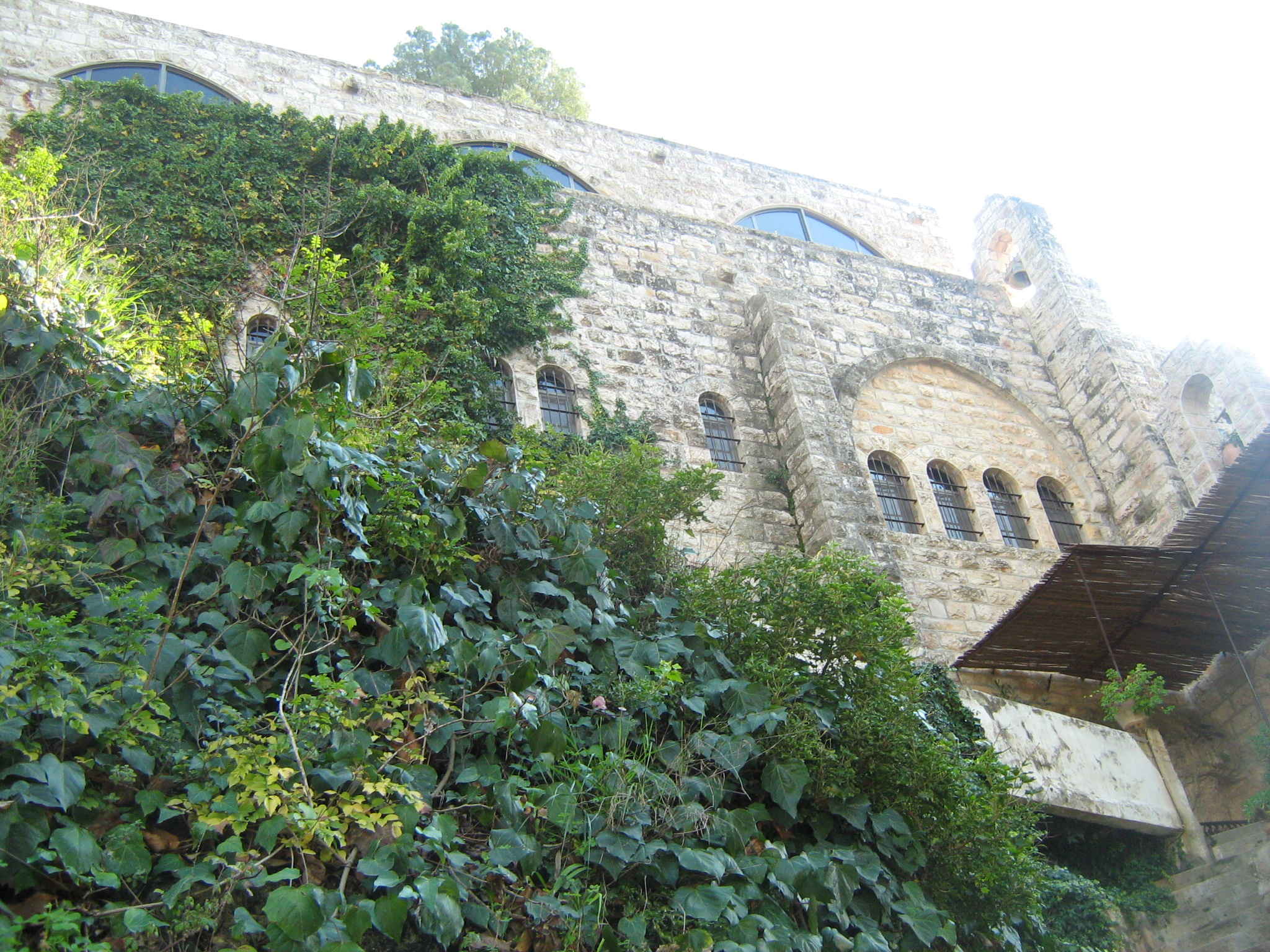 מנזר יוחנן במדבר